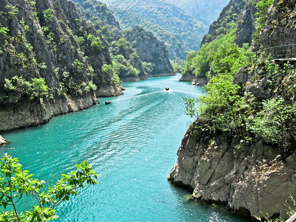 Кањон